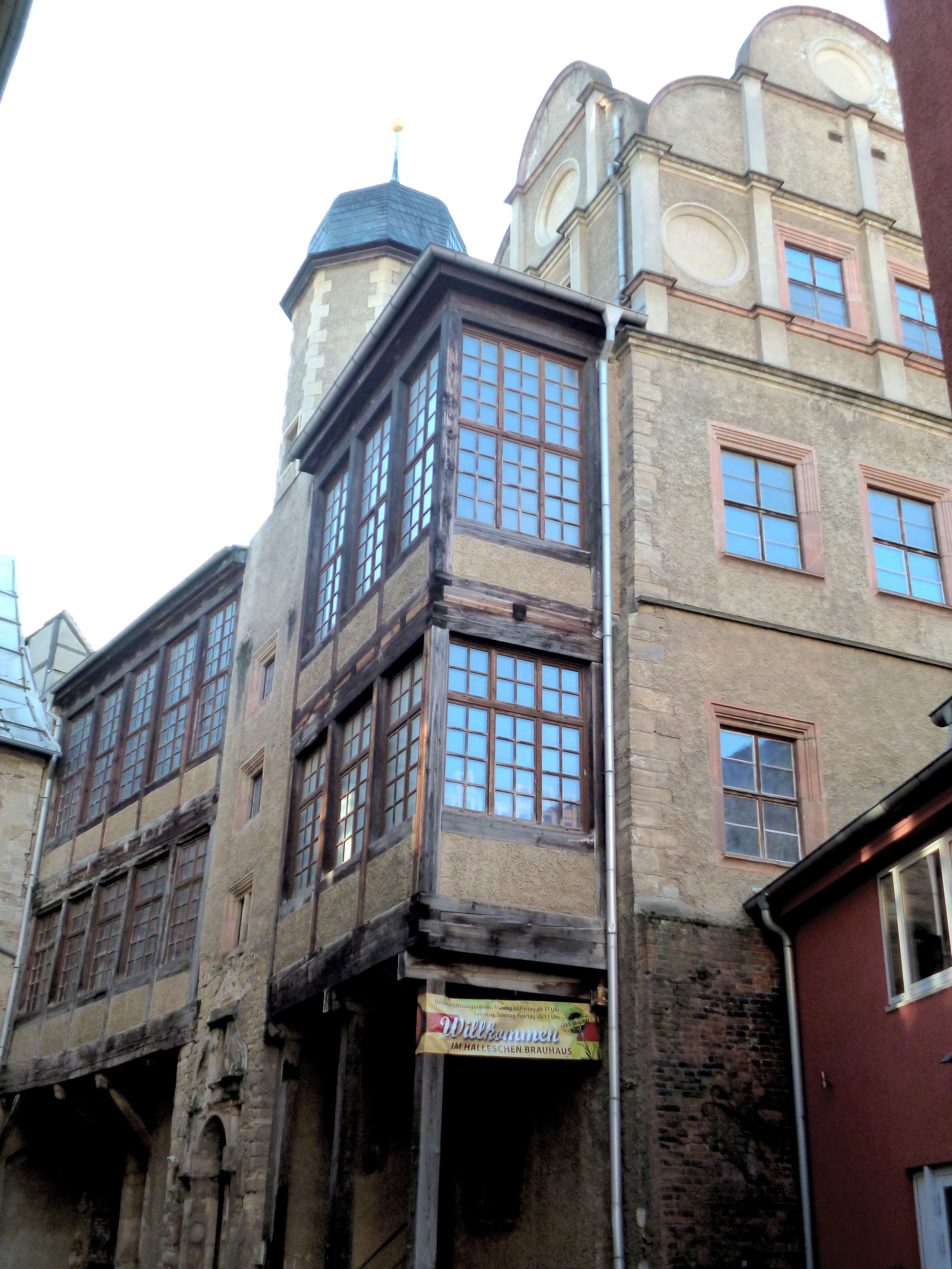 Palais Kühler Brunnen, Saalbau, Halle (Saale)